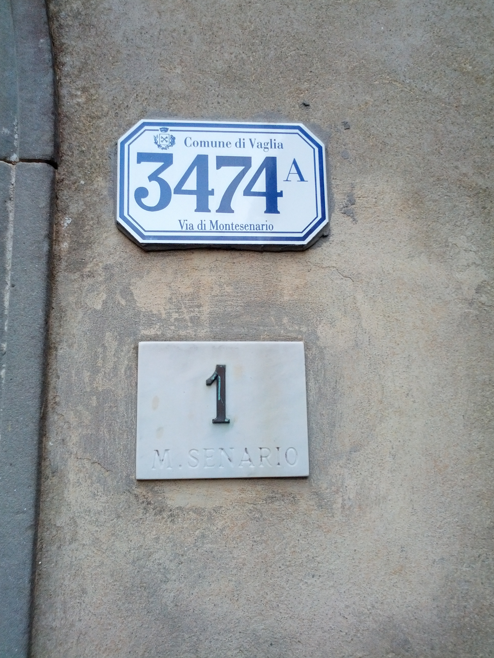 Numero civico del Monastero di Monte Senario a Fiesole E' stato declassato dal n.ro 1 al n.ro 3.474